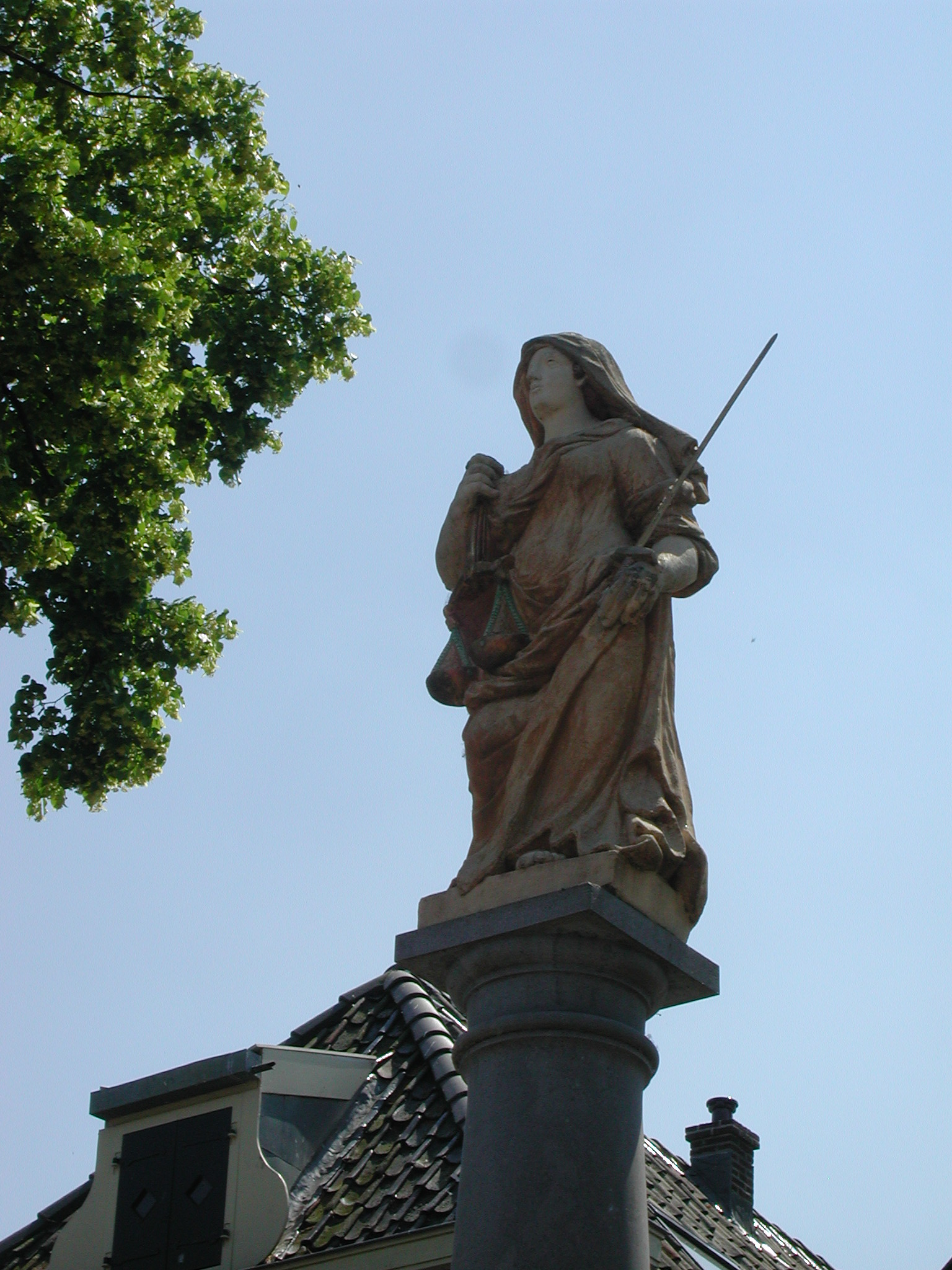 Hekendorp, Vrouwe Justitia. Auteur P.H.Louw, eigen werk, vrij voor gebruik